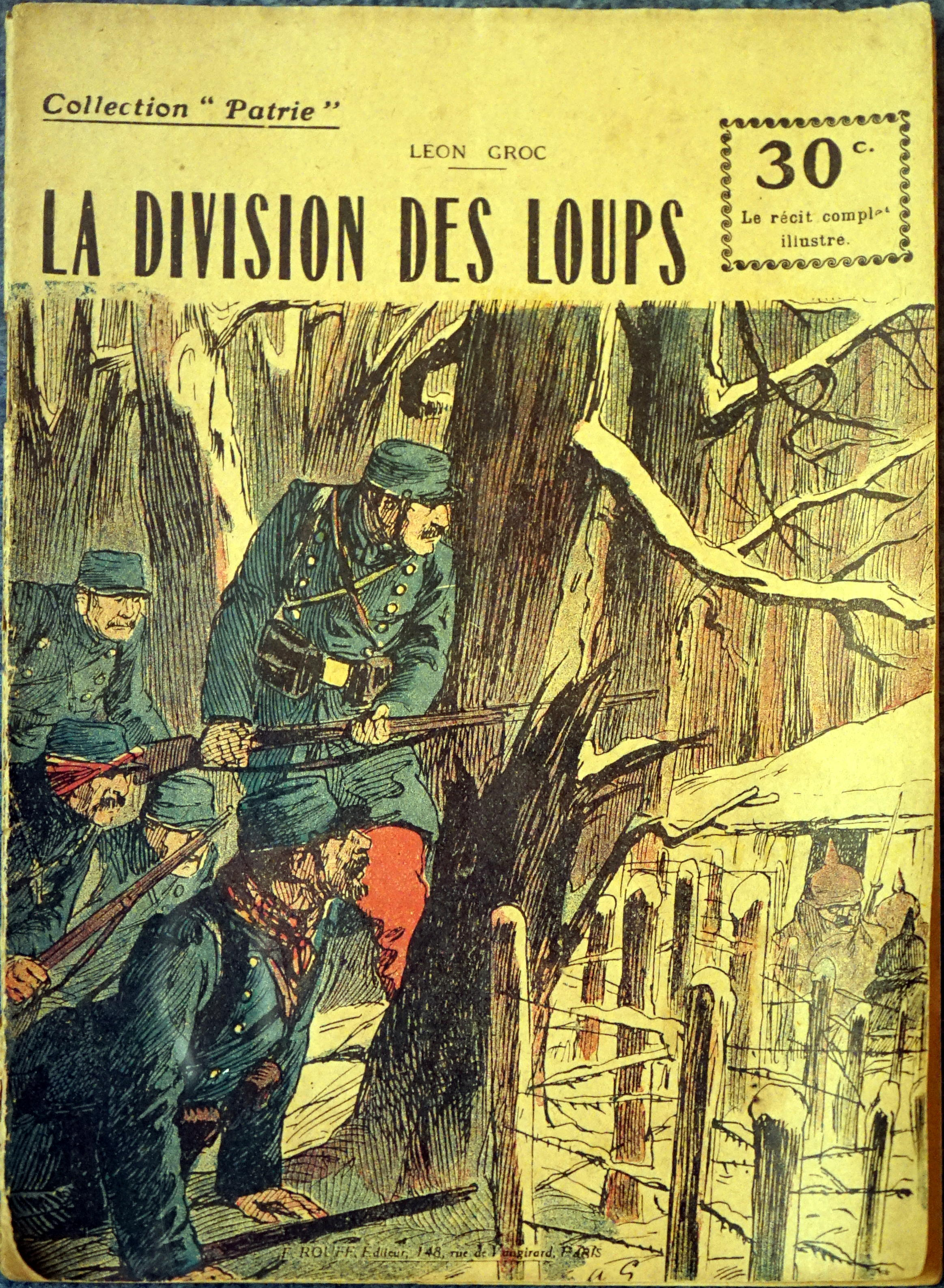 présenté au musée de Toul.